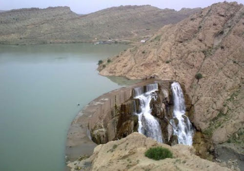 ابریز قدیمی سد کبار در فصل پر آبی(اواخر فروردین ماه(